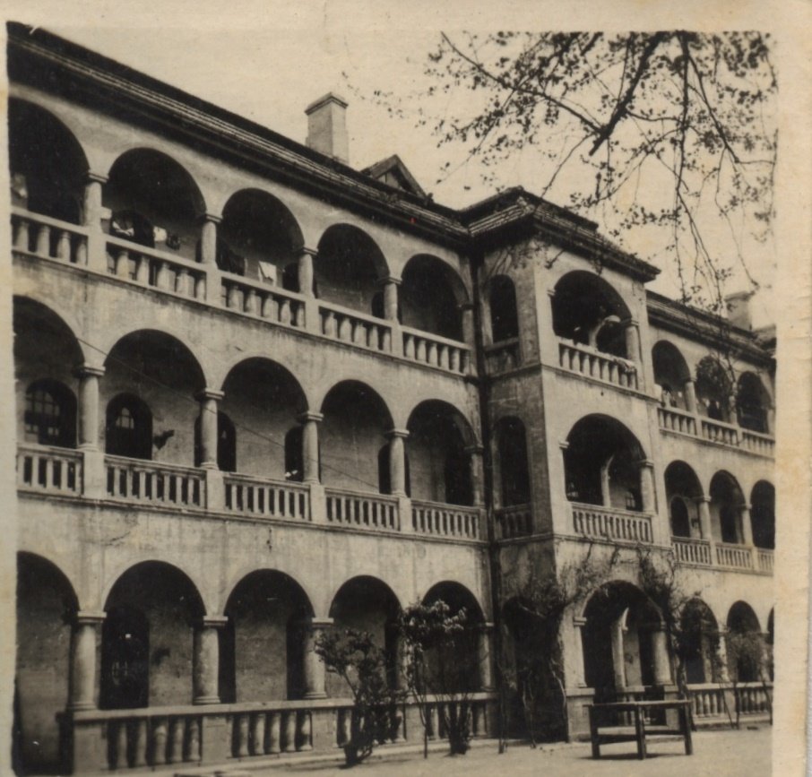 青岛二中老楼